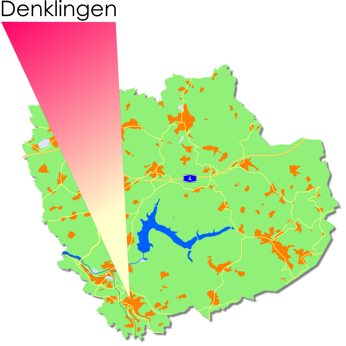 Lage von Denklingen in Reichshof.